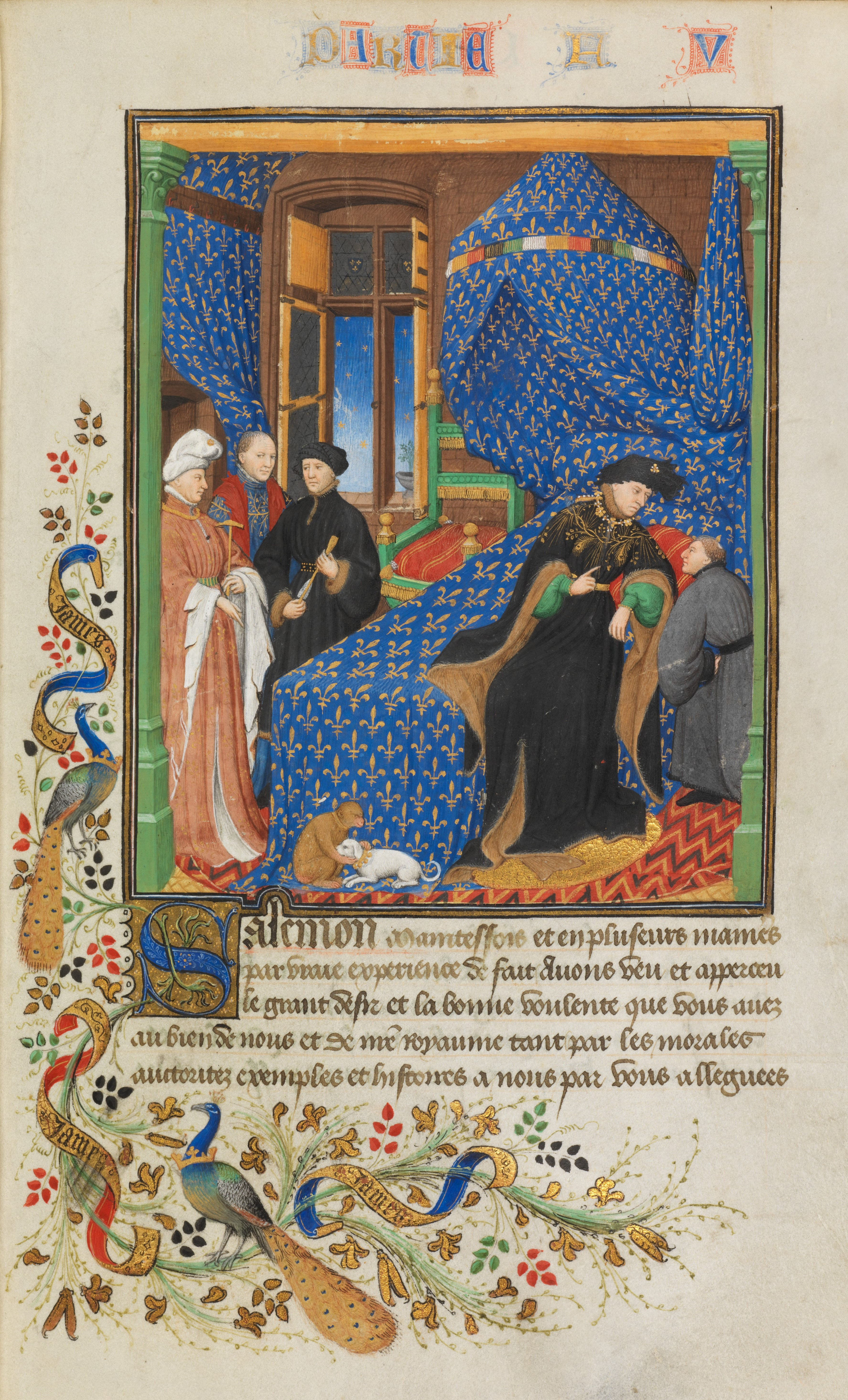 Dialogue de Charles VI avec Pierre Salmon